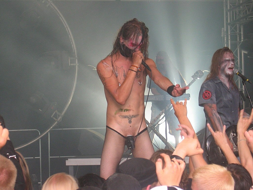 Turmion Kätilöt at Tuska Open Air Metal Festival 2005.